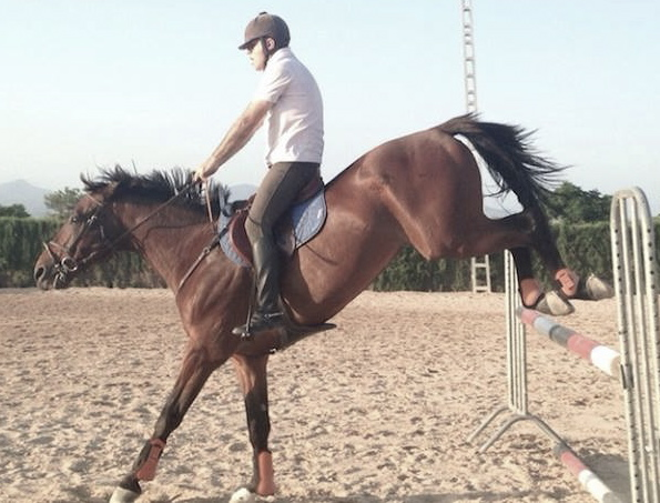 Recibimiento o aterrizaje en la segunda fase del salto